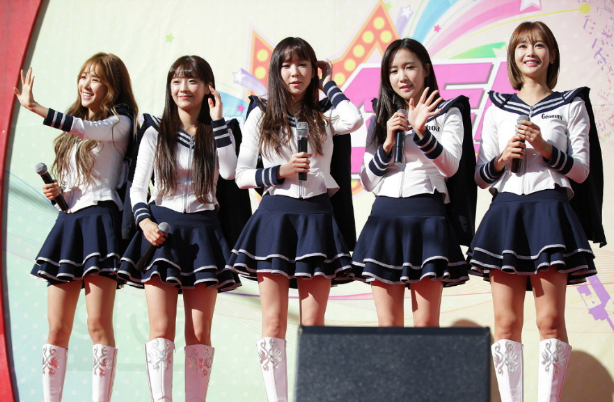 크레용팝(Crayon Pop) 도시 꼬마들의 행복한 축제 티브로드 원음방송